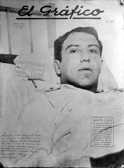 Tapa de la revista El Grafico. N° 275. Fecha 11/10/1924